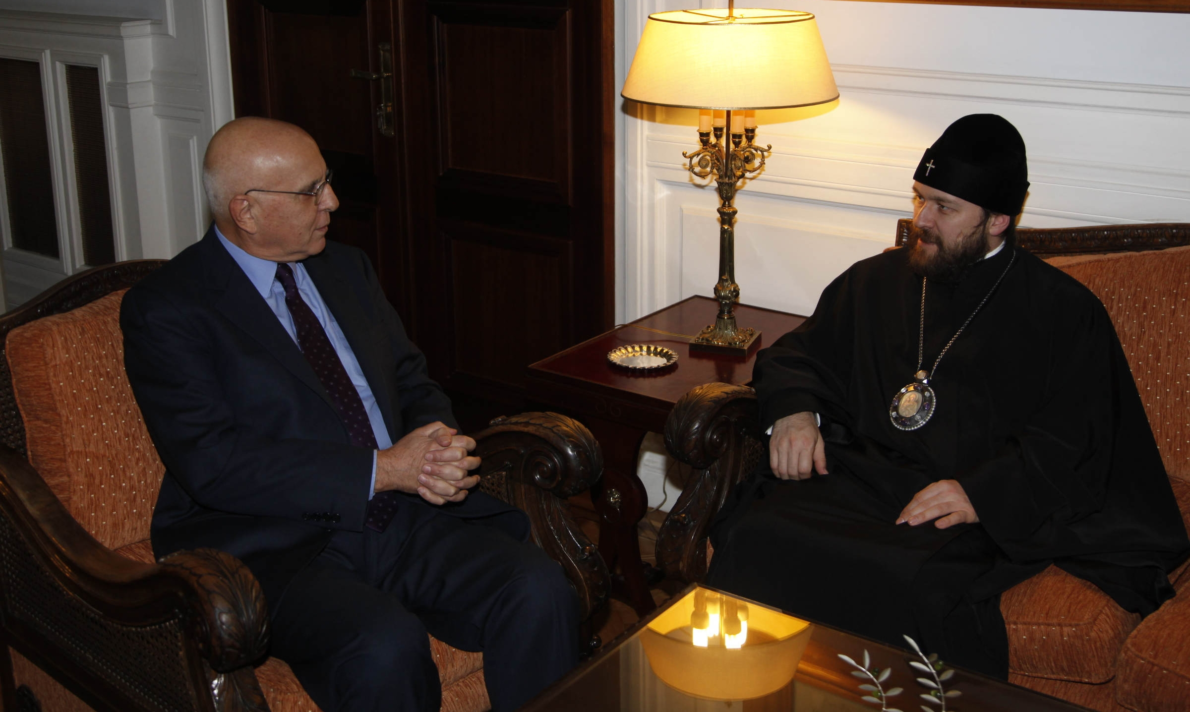 Στις 12 Δεκεμβρίου 2011, ο Υπουργός Εξωτερικών Σταύρος Δήμας είχε συνάντηση με το Μητροπολίτη Βολοκολάμσκ Ιλαρίωνα, Πρόεδρο του τμήματος των Εξωτερικών Εκκλησιαστικών Σχέσεων του Πατριαρχείου Μόσχας.